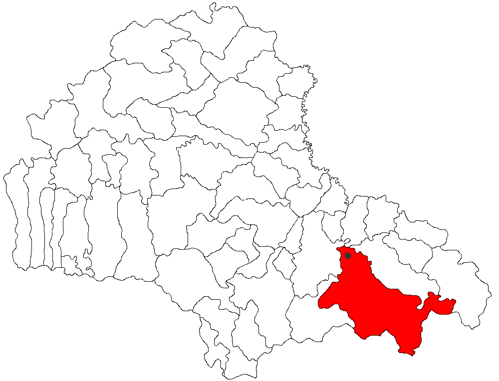 Categorie:Hărţi ale judeţului Braşov